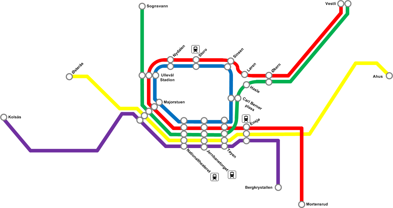 T-banen i Oslo pr 2015. Forutsatt: Holmenkollen er overført til trikkenettet Haslesvingen er bygget Furusetbanen er forlenget til Ahus Grefsen og Tøyen jernbanestasjon "flyttes", Storo stasjon og Ensjø stasjon får togstasjon NB: Ringen vil fremdeles gå i loop, men mot hvilken rute er ukjent noen ruter (f.eks Mortensrud-Storo-Vestli, eller Ahus-Majorstuen) kan ha to ruter i kvarteret